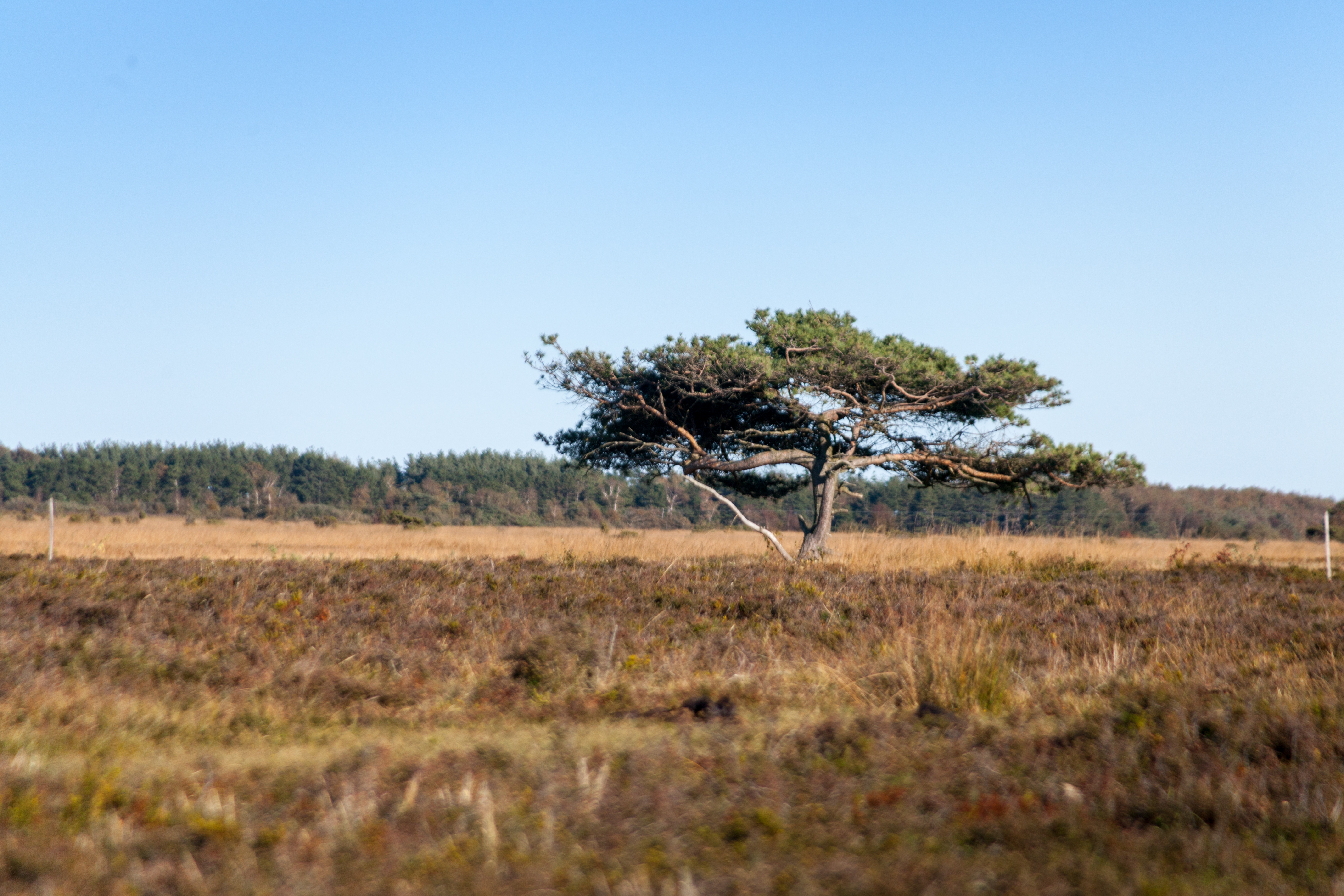 Rønnerne